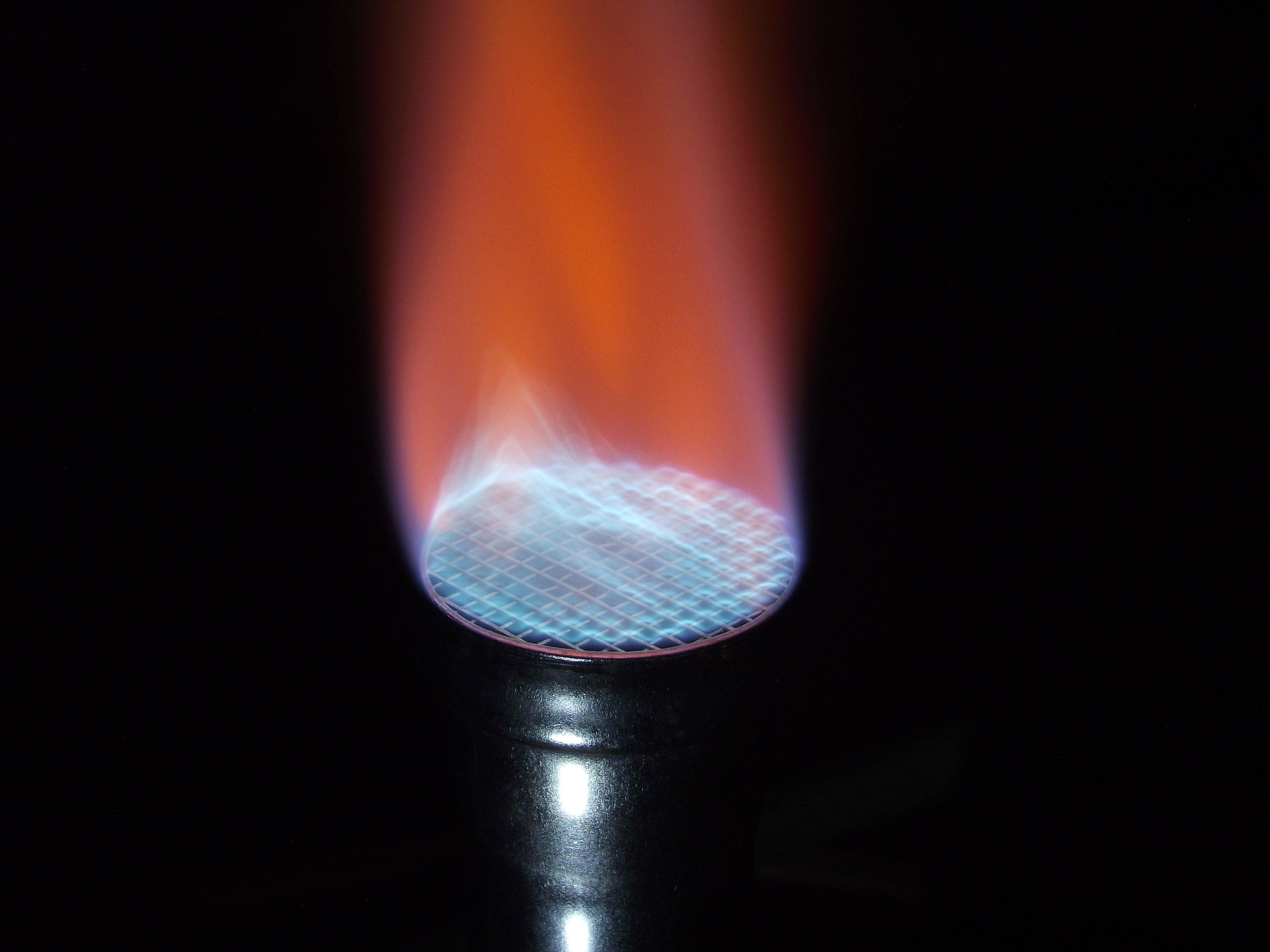 Meker-Fisher burner.